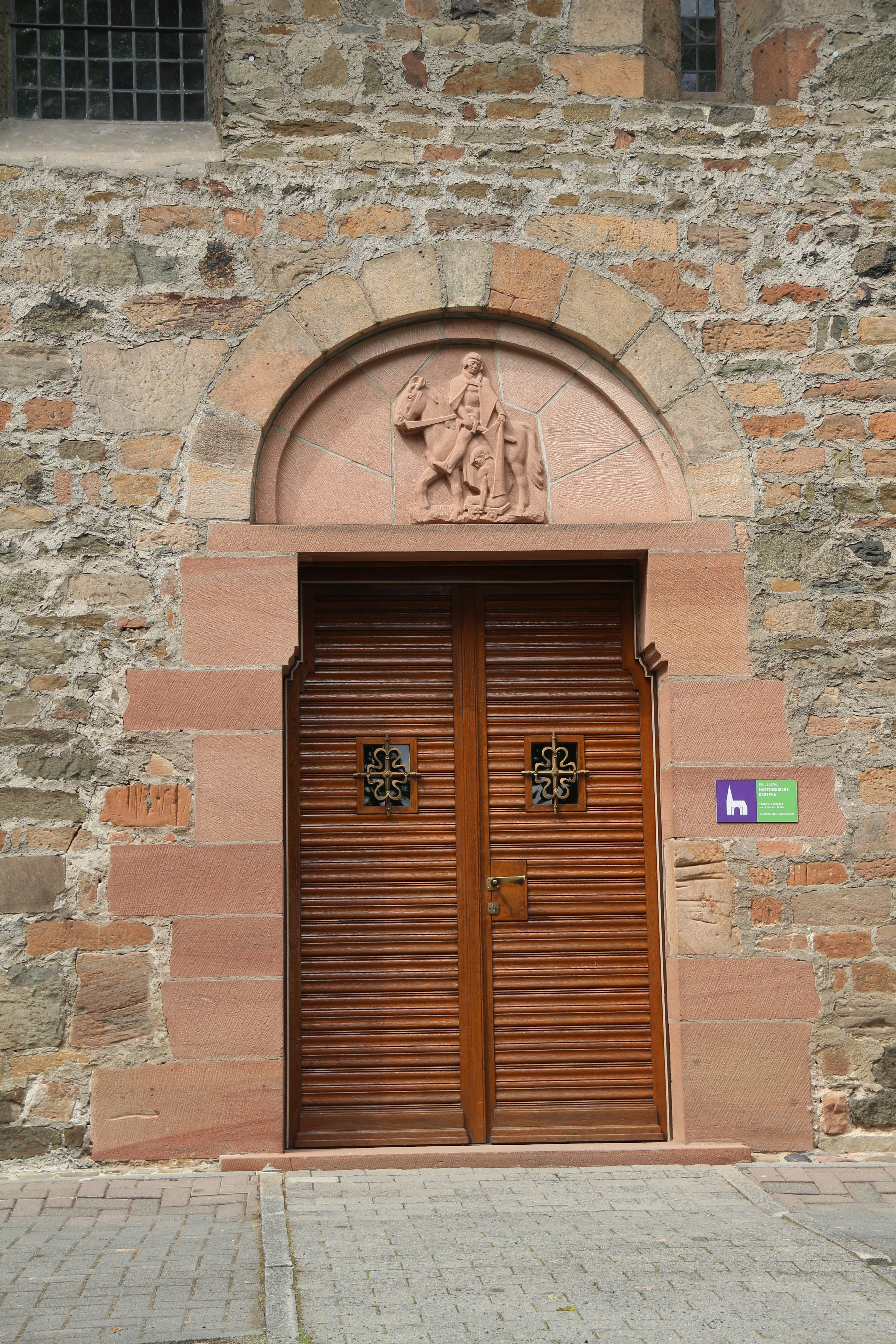 Martinskirche (Dautphe)